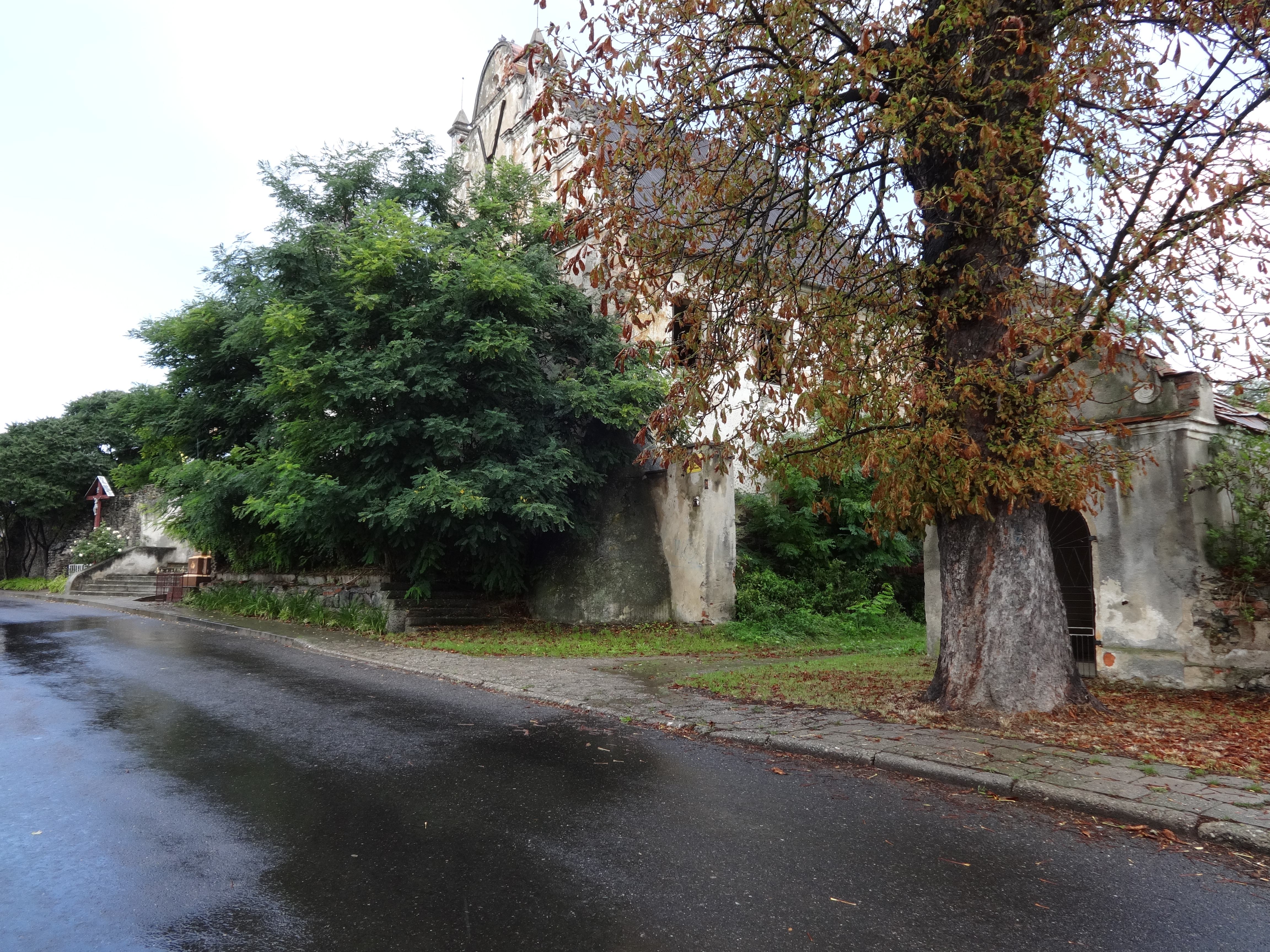 Lubiatów, dwór, 1600, poł. XIX